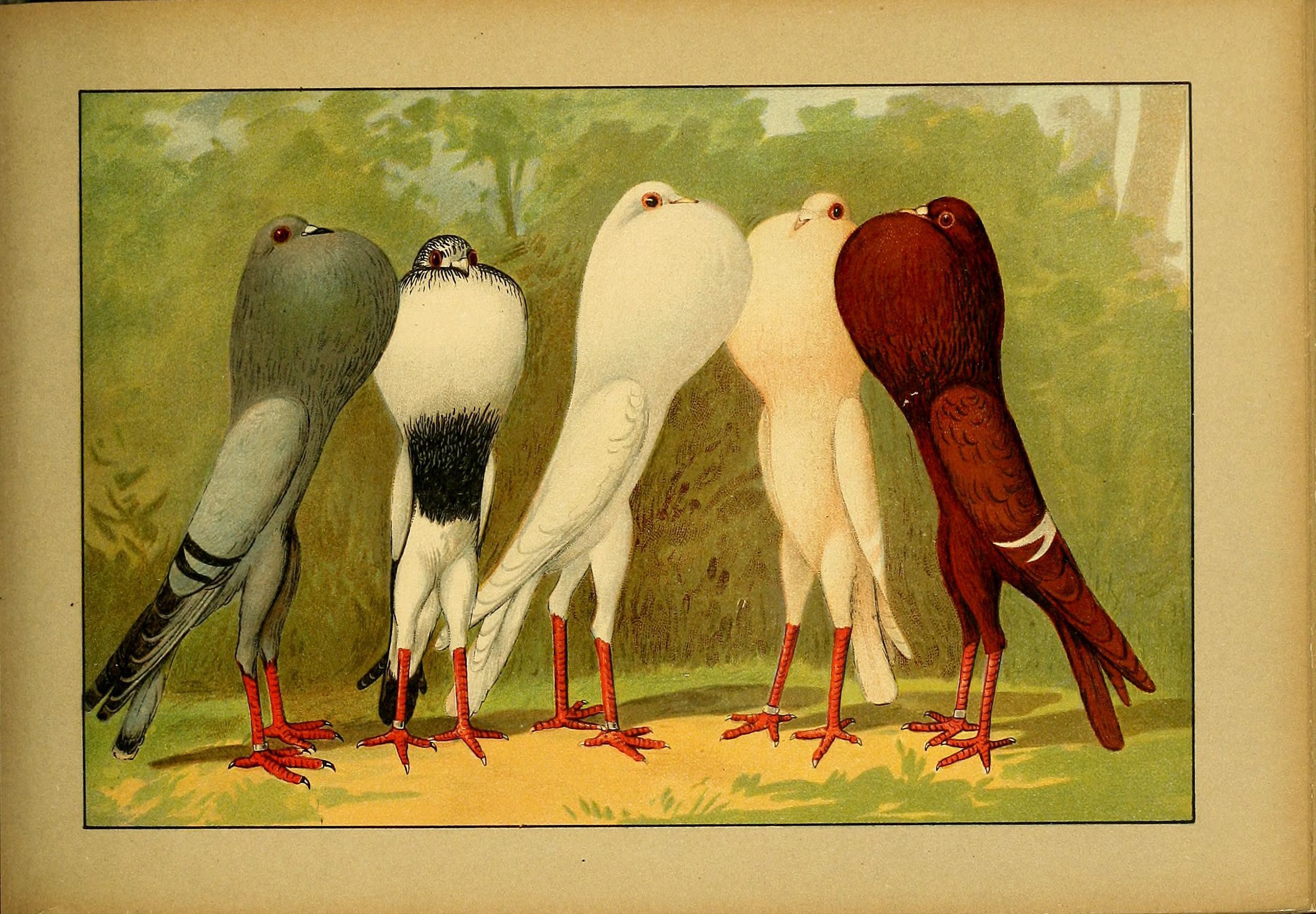 Deutsch